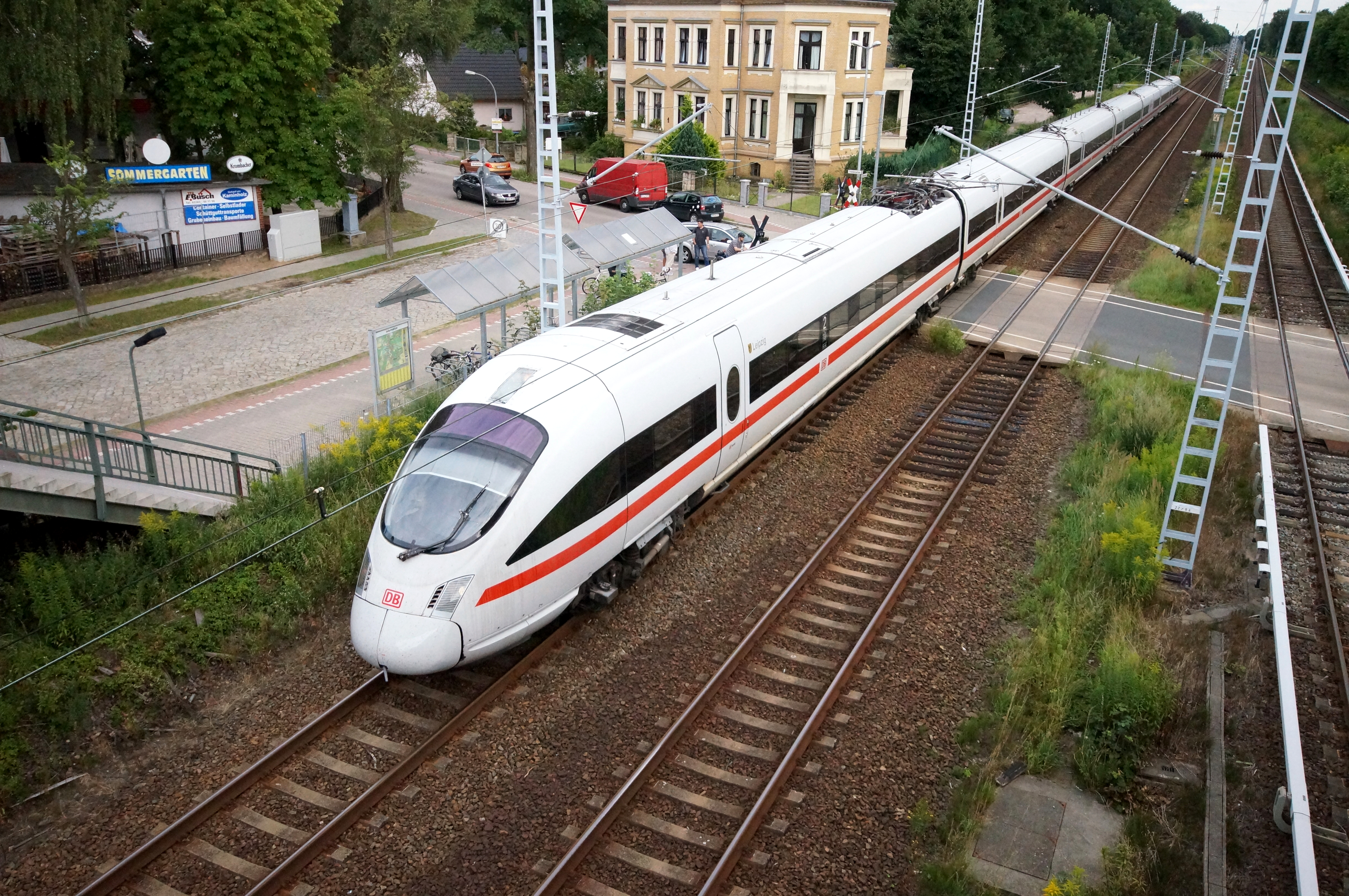 Dachpartie der ersten Baureihe des ICE T (Tz 1126, „Leipzig“) im Hohen Neuendorf-Borgsdorfer Bahnhof